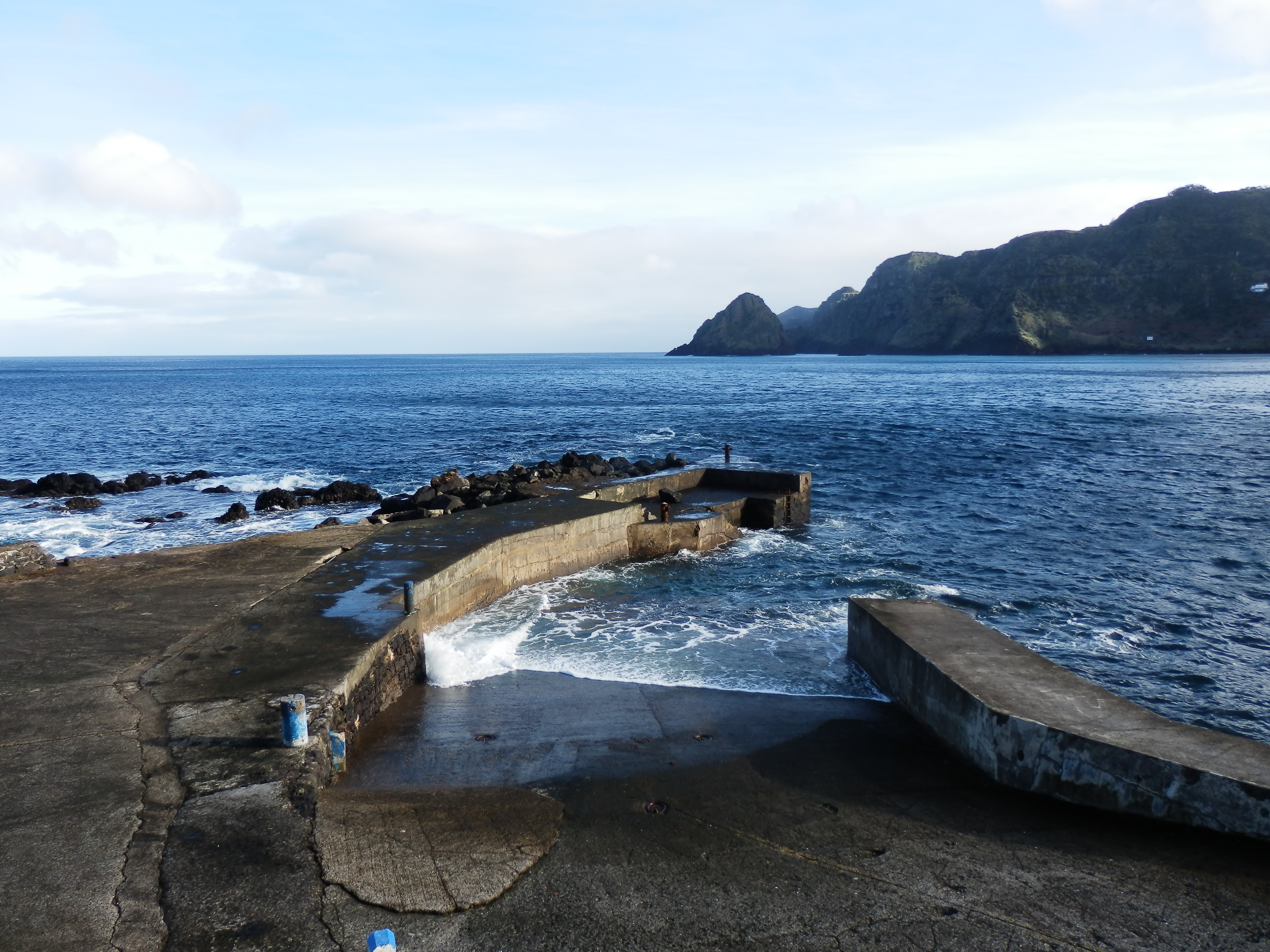 Vista da rampa